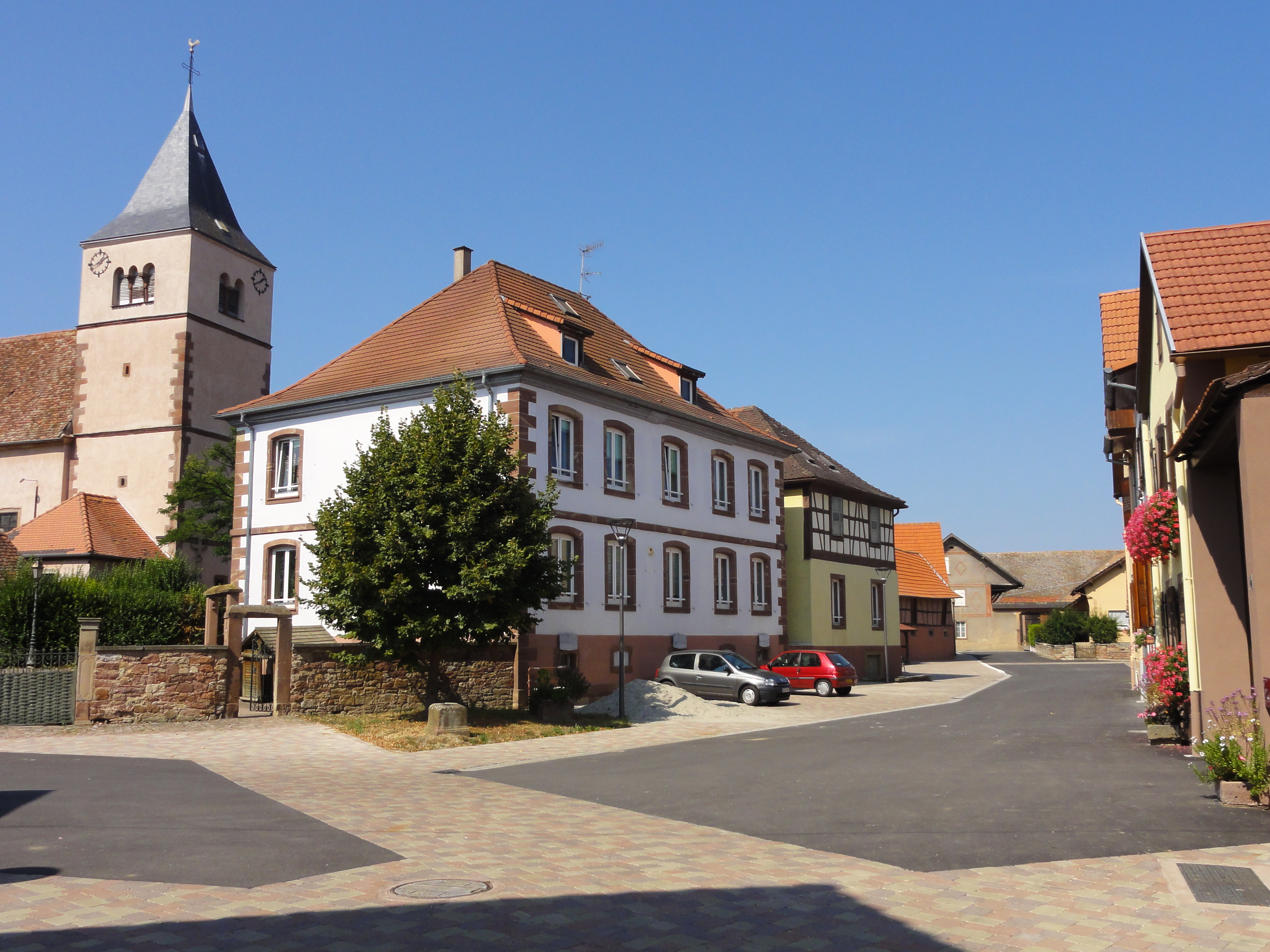 Alsace, Bas-Rhin, Fessenheim-le-Bas, Mairie-école (XIXe). .